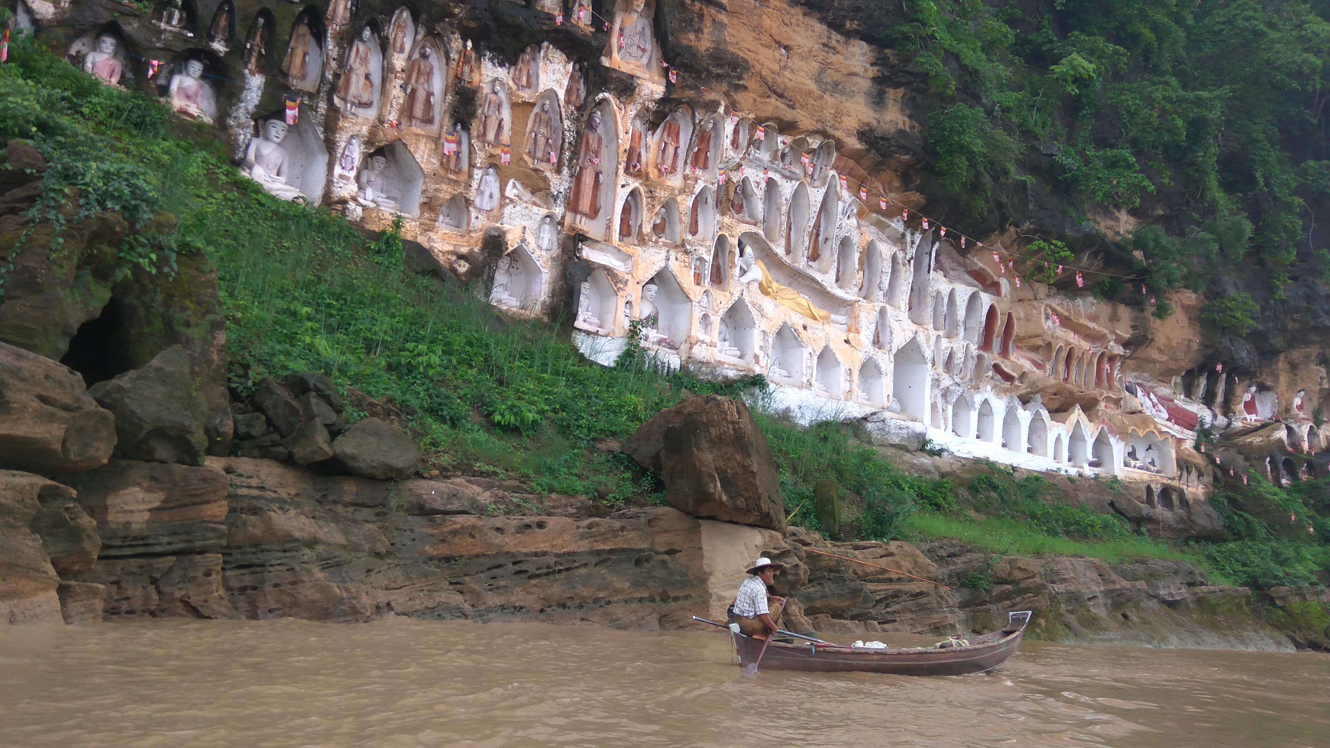 မြန်မာဘာသာ: ဧရာဝတီမြစ်ကမ်းဘေးရှိ အကောက်တောင်သို့ စက်လှေဖြင့်သွားရာလမ်းတွင် မြင်တွေ့ရသည့် နံရံကပ်ဗုဒ္ဓရုပ်ပွားတော်များ